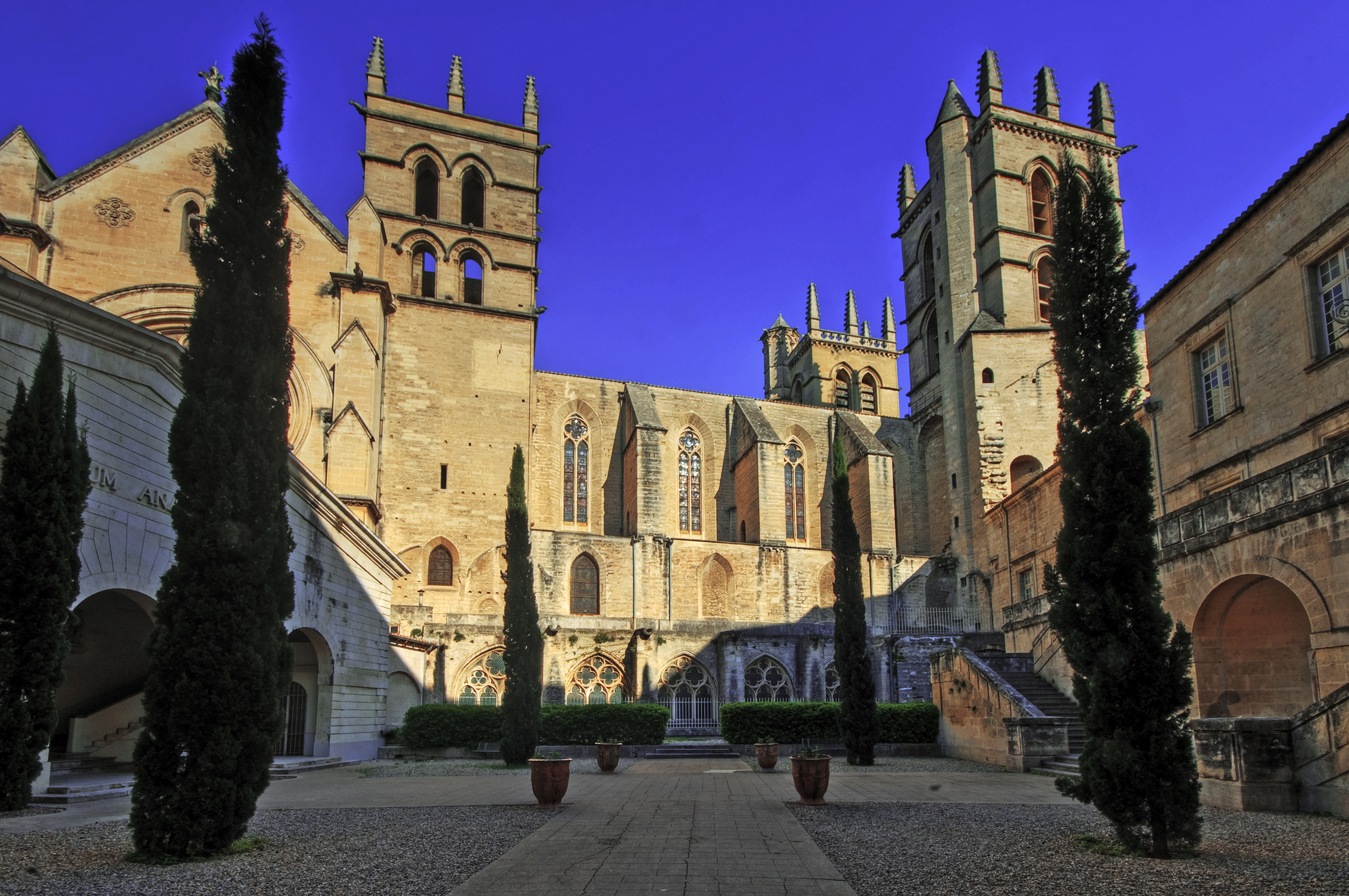 Take here a large view! La cathédrale Saint-Pierre de Montpellier était à l'origine la chapelle du monastère bénédictin de Saint-Benoît, fondée en 1364, par le pape Urbain V. Cette église fut érigée en cathédrale en 1536, lorsque le siège épiscopal est transféré de Maguelone à Montpellier. L'historienne montpelliéraine Louise Guiraud décrit précisément l'architecture du bâtiment ainsi que la composition des différentes chapelles. From Wikipedia, the free encyclopedia